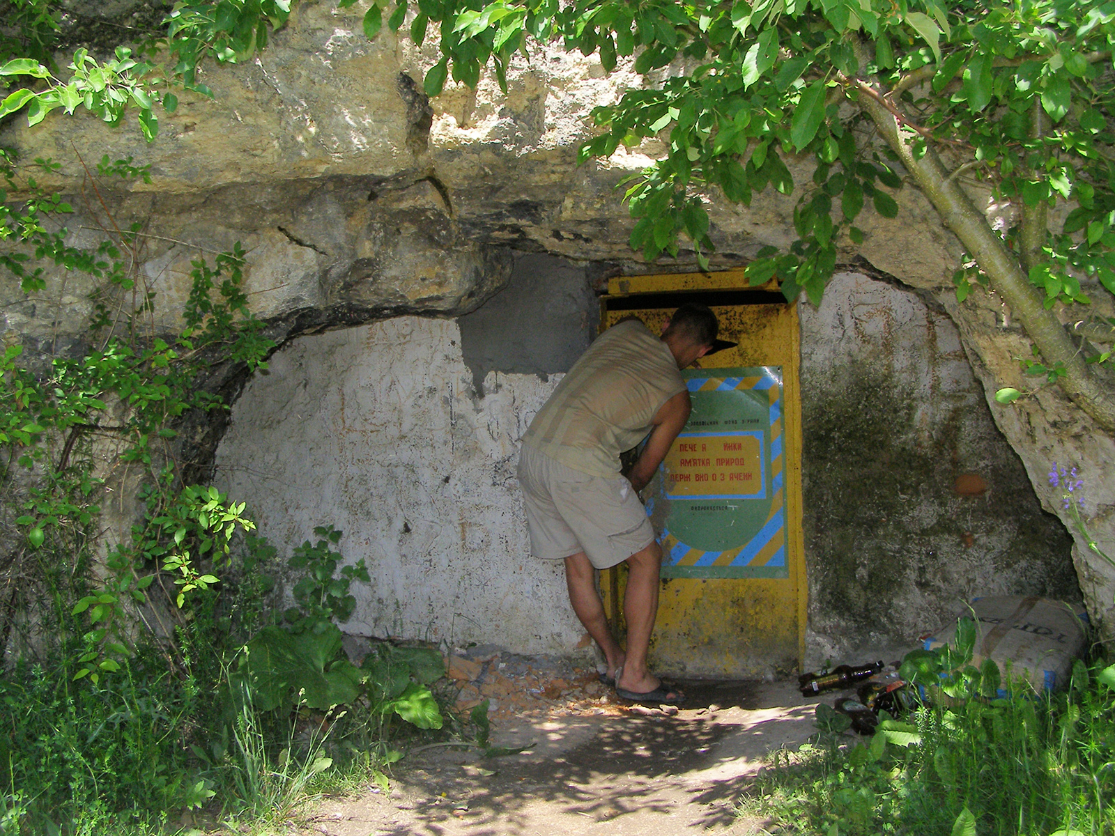 Печера «Млинки», Чортківський район, с. Залісся, правий схил потічка Млинки, верхня тераса